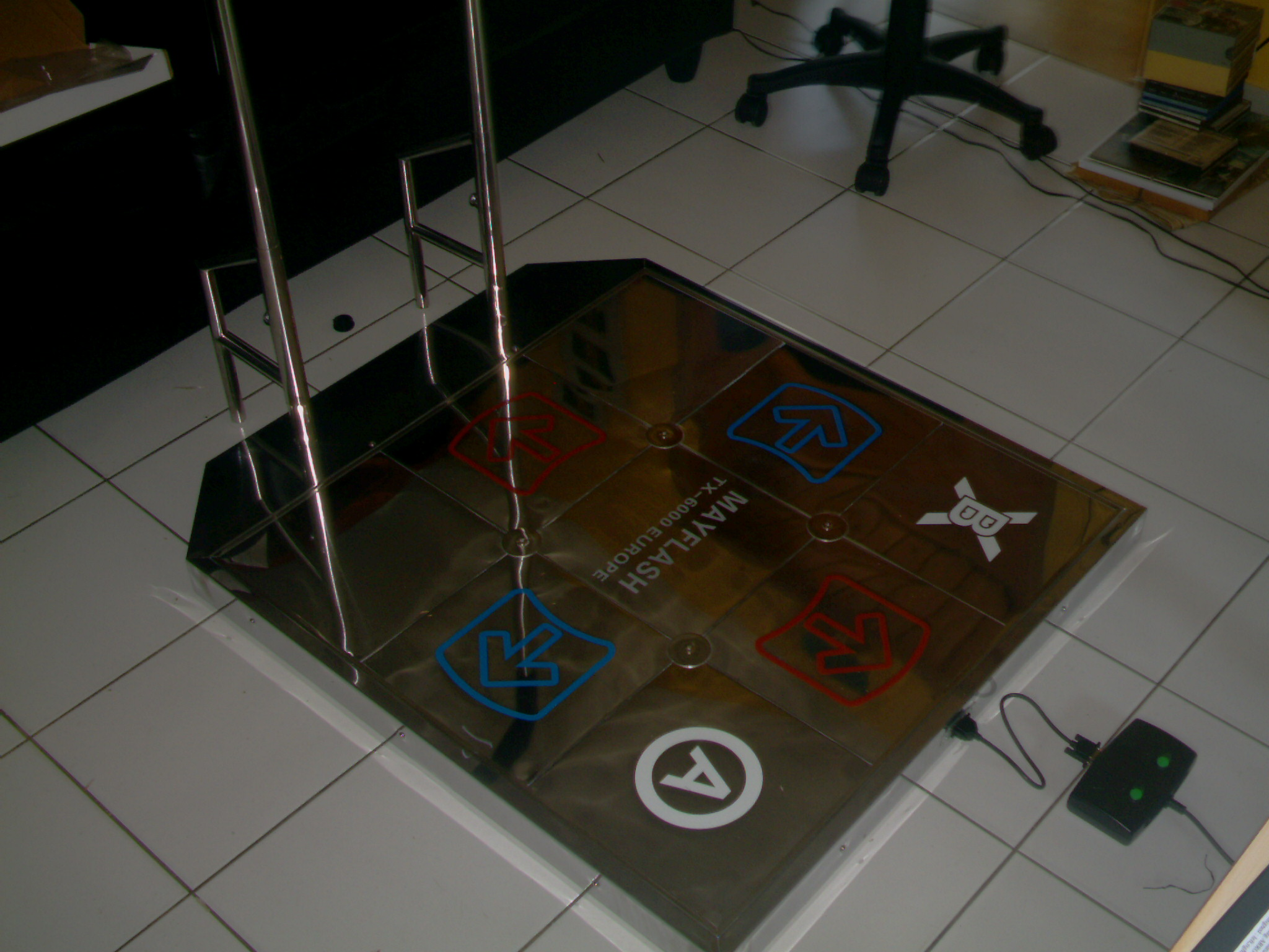 Tapis en metal pour la maison. importé en Europe par mayflash.eu